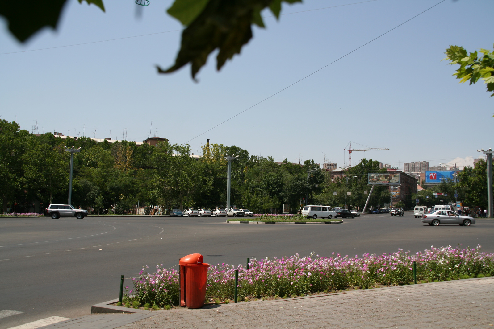 Place de France à Erevan